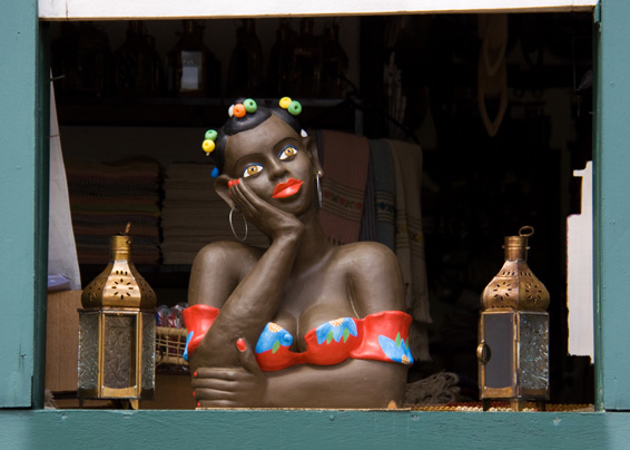 Escultura popular no estado brasileiro de Minas Gerais.